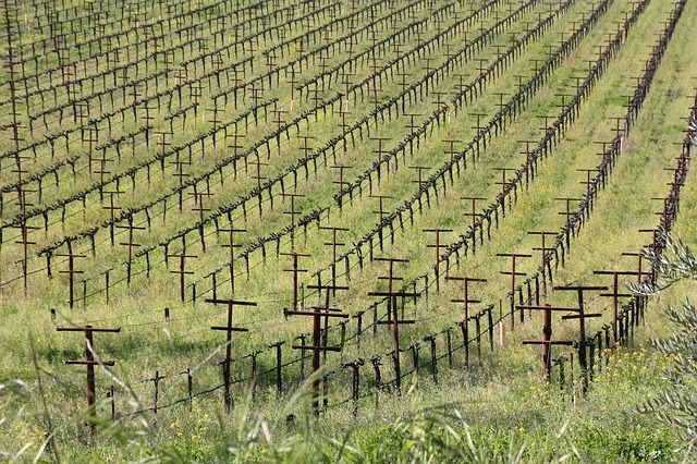 Cela est une vigne avec un systeme de palissage en T-Bord, sans végétation.